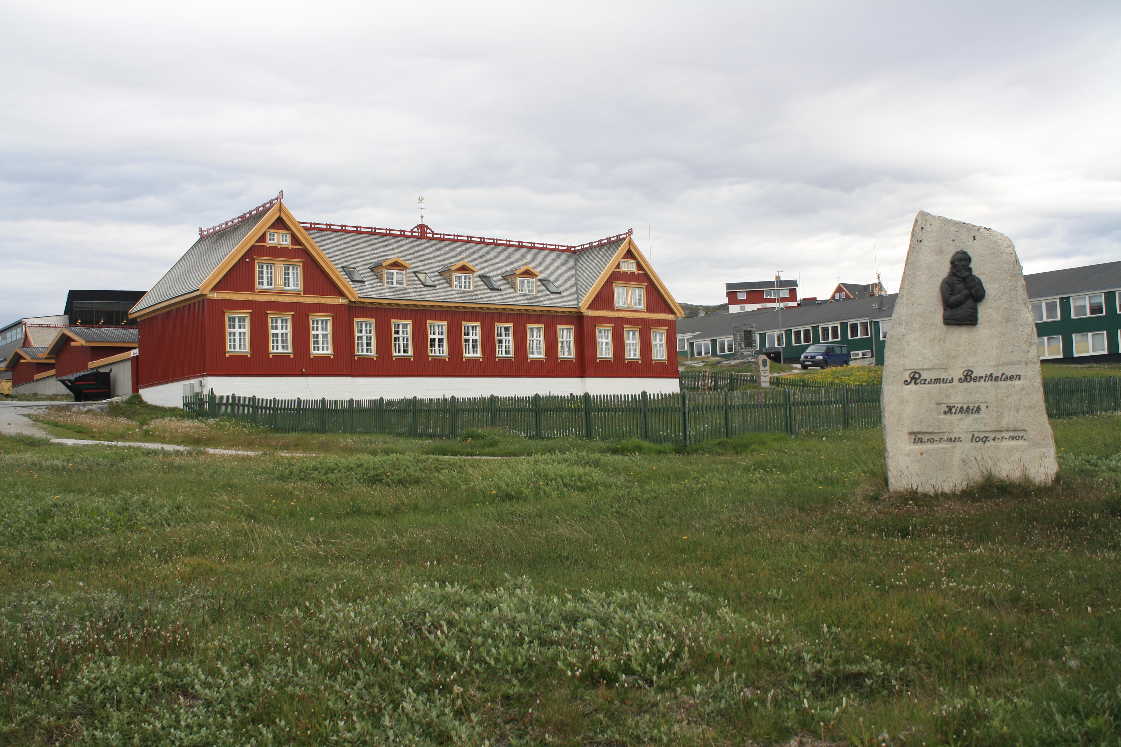 Grønlands Seminarium und Gedenkstein für Rasmus Berthelsen in Nuuk, Grönland.